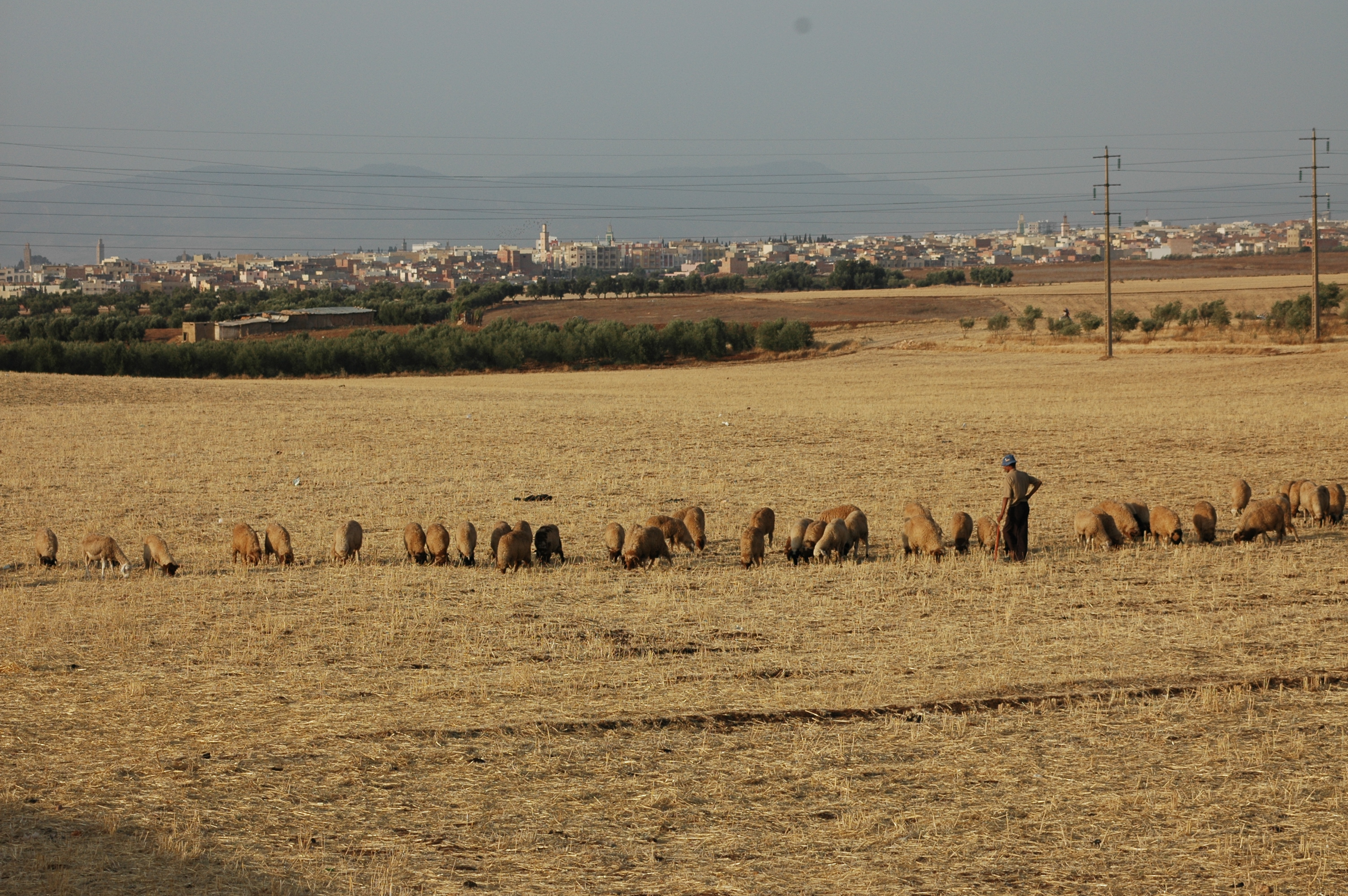 Troupeau ovin pâturant sur chaumes près de Khémisset